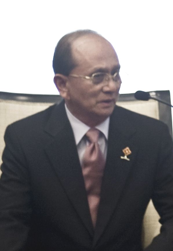 General Thein Sein (Burmese: သိန်းစိန်; born 1945), current prime minister of Burma / หารือทวิภาคีกับนายกรัฐมนตรี ณ ห้องบ่อฝ้าย การประชุมสุดยอดอาเซียน ครั้งที่ 15 หัวหิน อำเภอชะอำ จังหวัดเพชรบุรี 23ตุลาคม2552 (The Official Site of The Prime Minister of Thailand Photo by พีรพัฒน์ วิมลรังครัตน์)